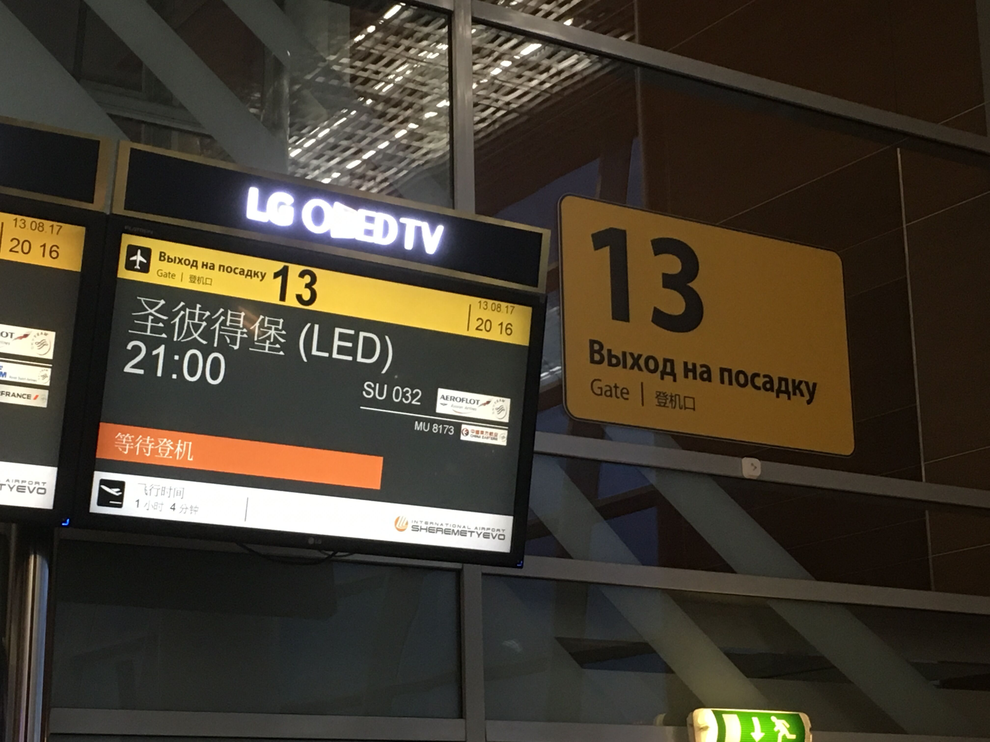 謝列梅捷沃國際機場13登機口